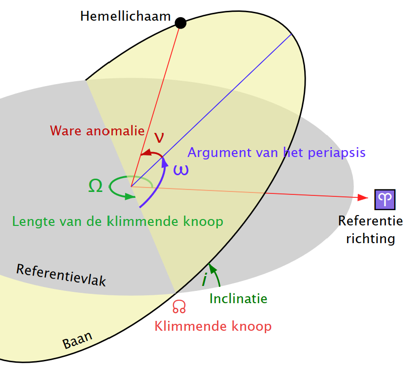 Baanelementen